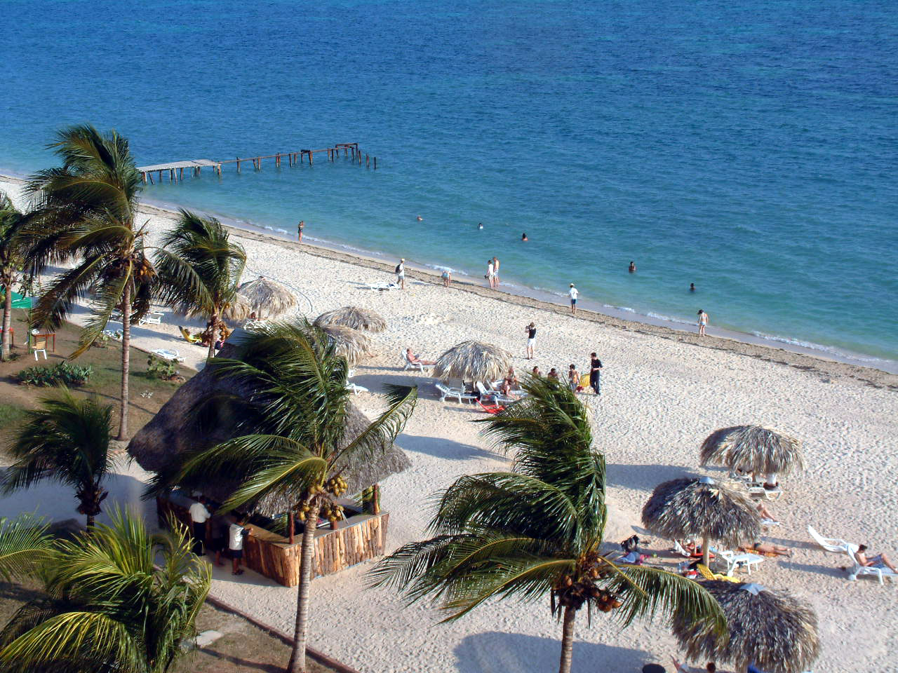 Playa Ancón, Trinidad, Cuba.